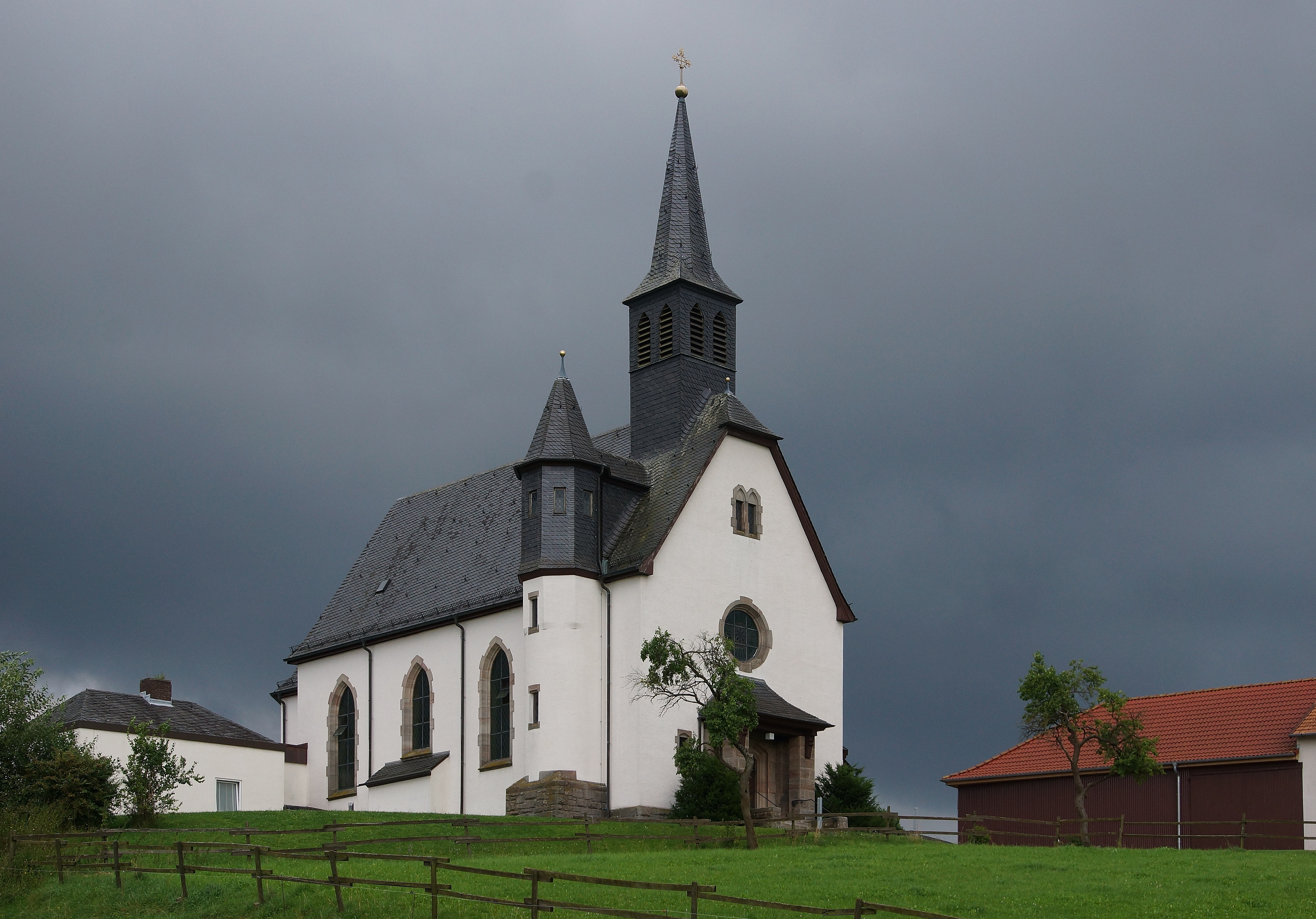 Katholische Filialkirche Sankt Anna in Dipperz-Friesenhausen in Gewitterwolken